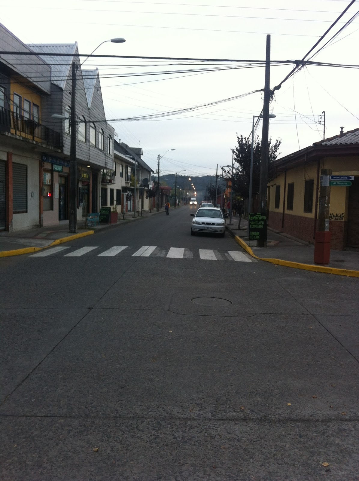 Esquina de la calle "La Concepción" con "Irarrázabal", Hualqui (Chile)